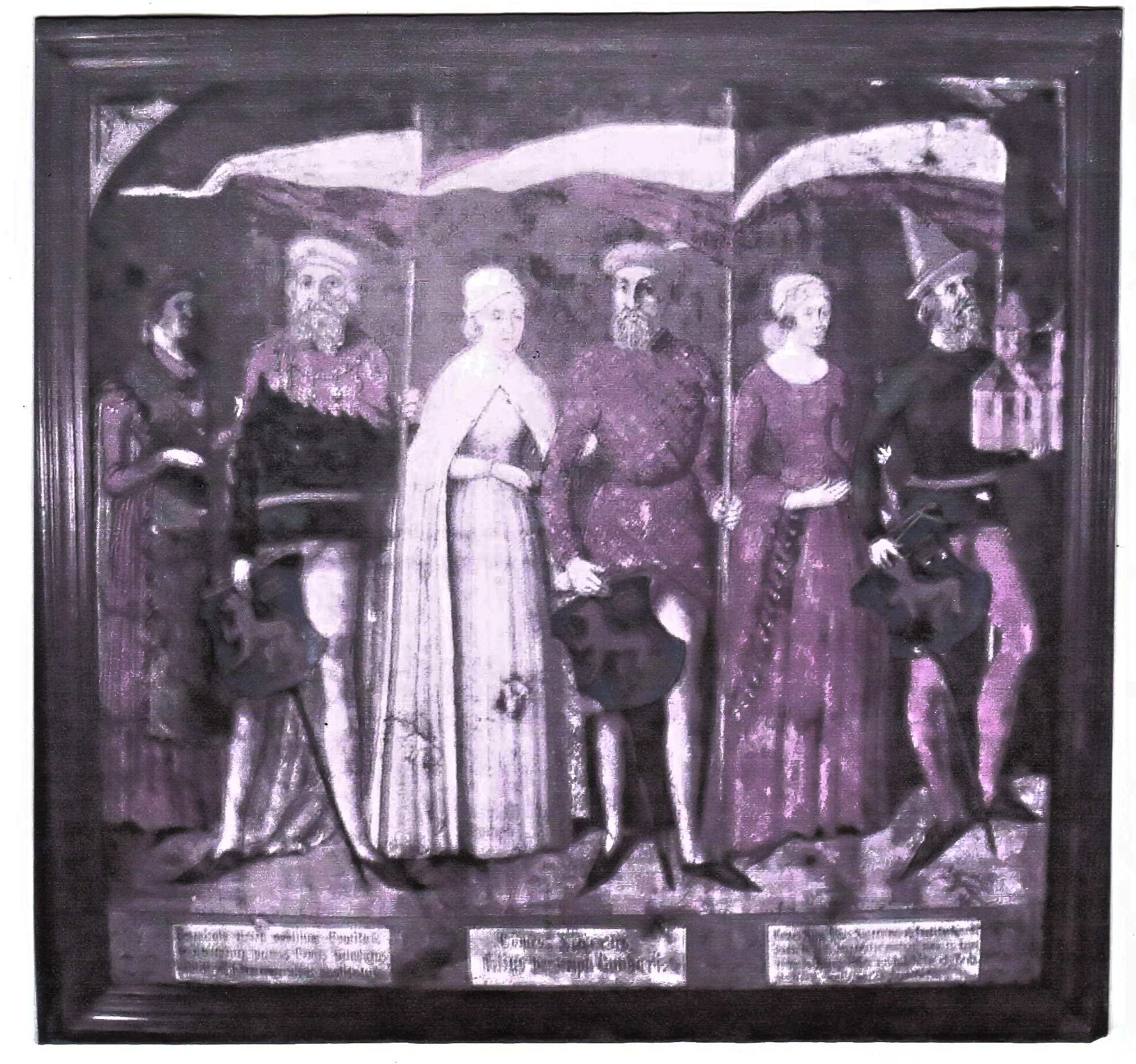 David Rubin Privatbesitz Käfernburger Gemälde mit Gundar, Sigerius und Sizzo